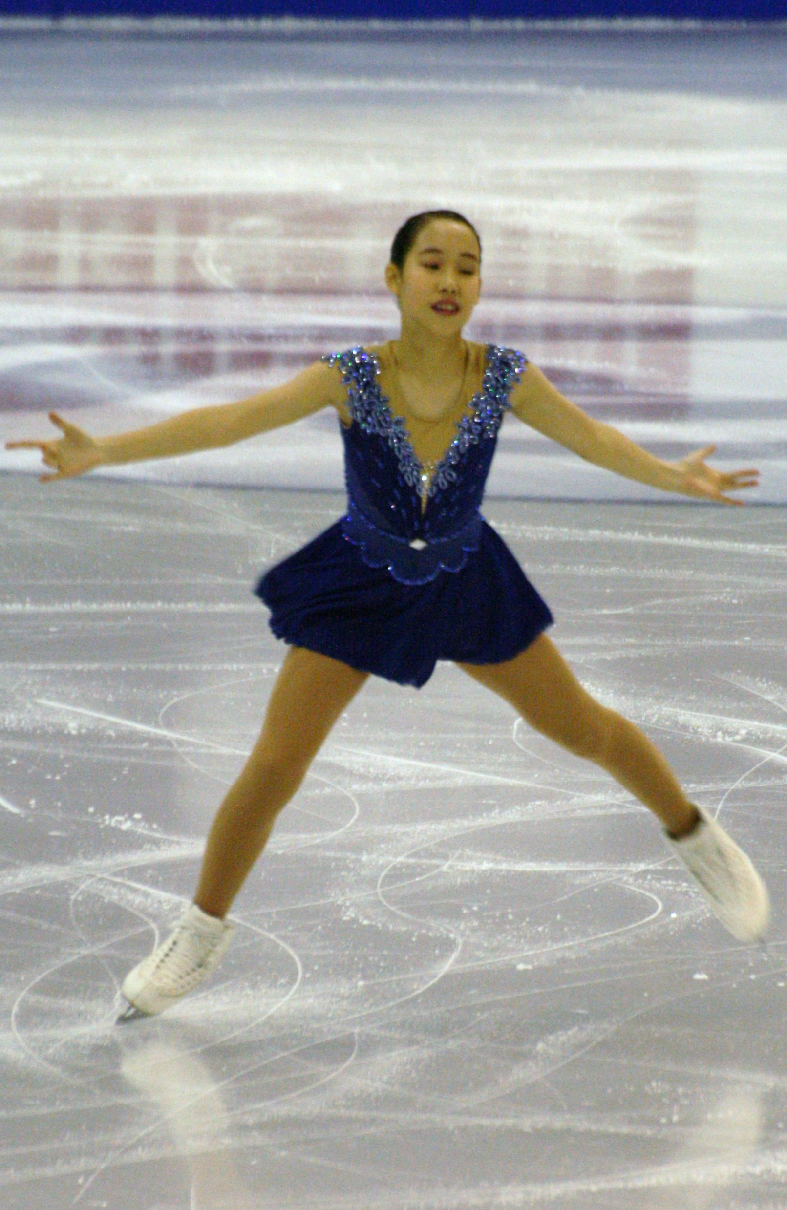 Май Михара (Япония) на финале Гран-при по фигурному катанию среди юниоров 2015-2016.